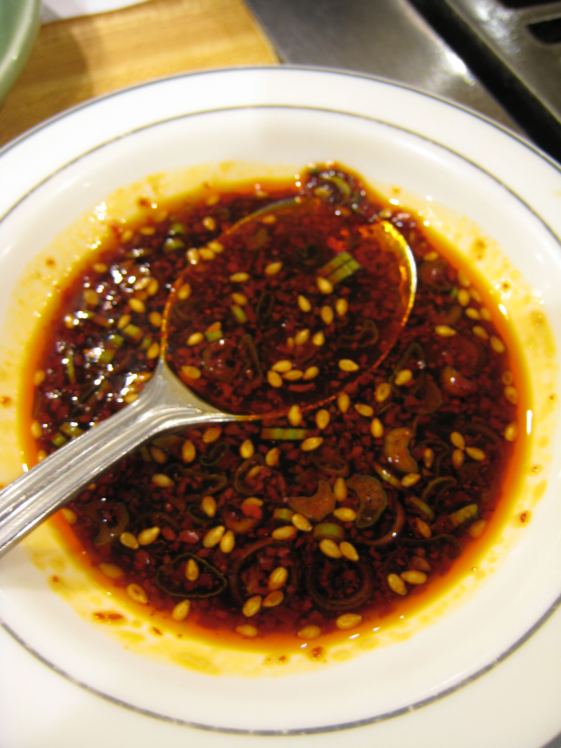 Choganjang, Korean sauce made with ganjang(soy sauce) and vineger